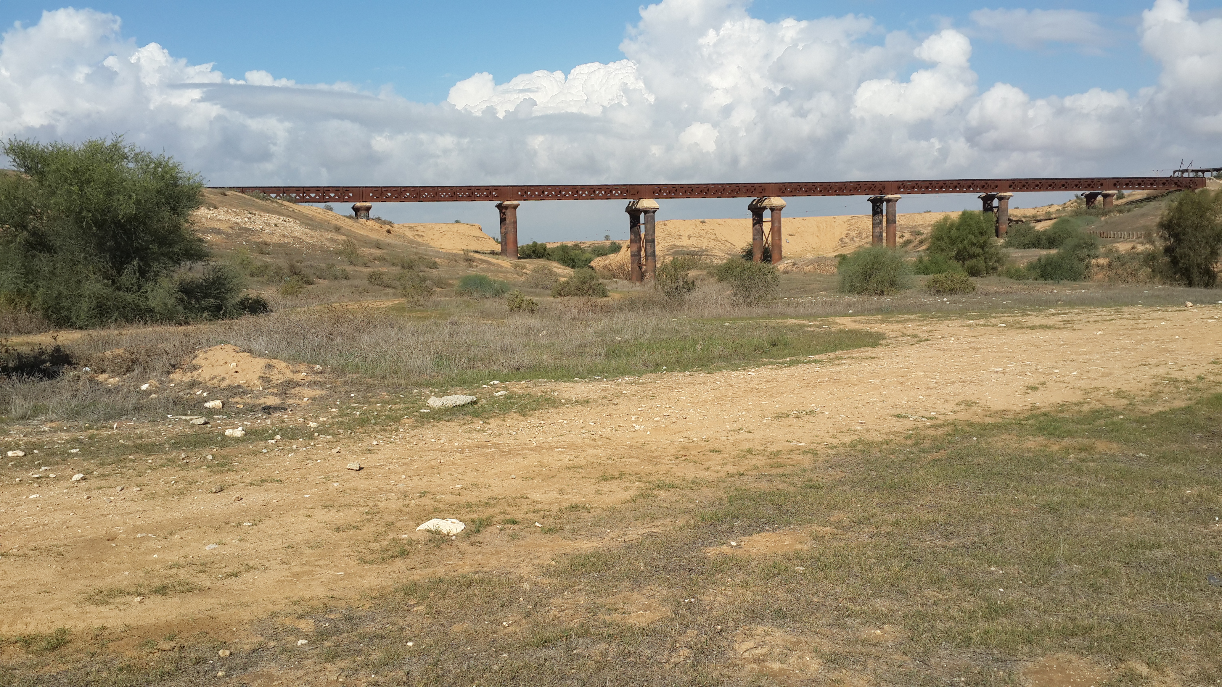 גשר הרכבת לייד אופקים בפארק שקד